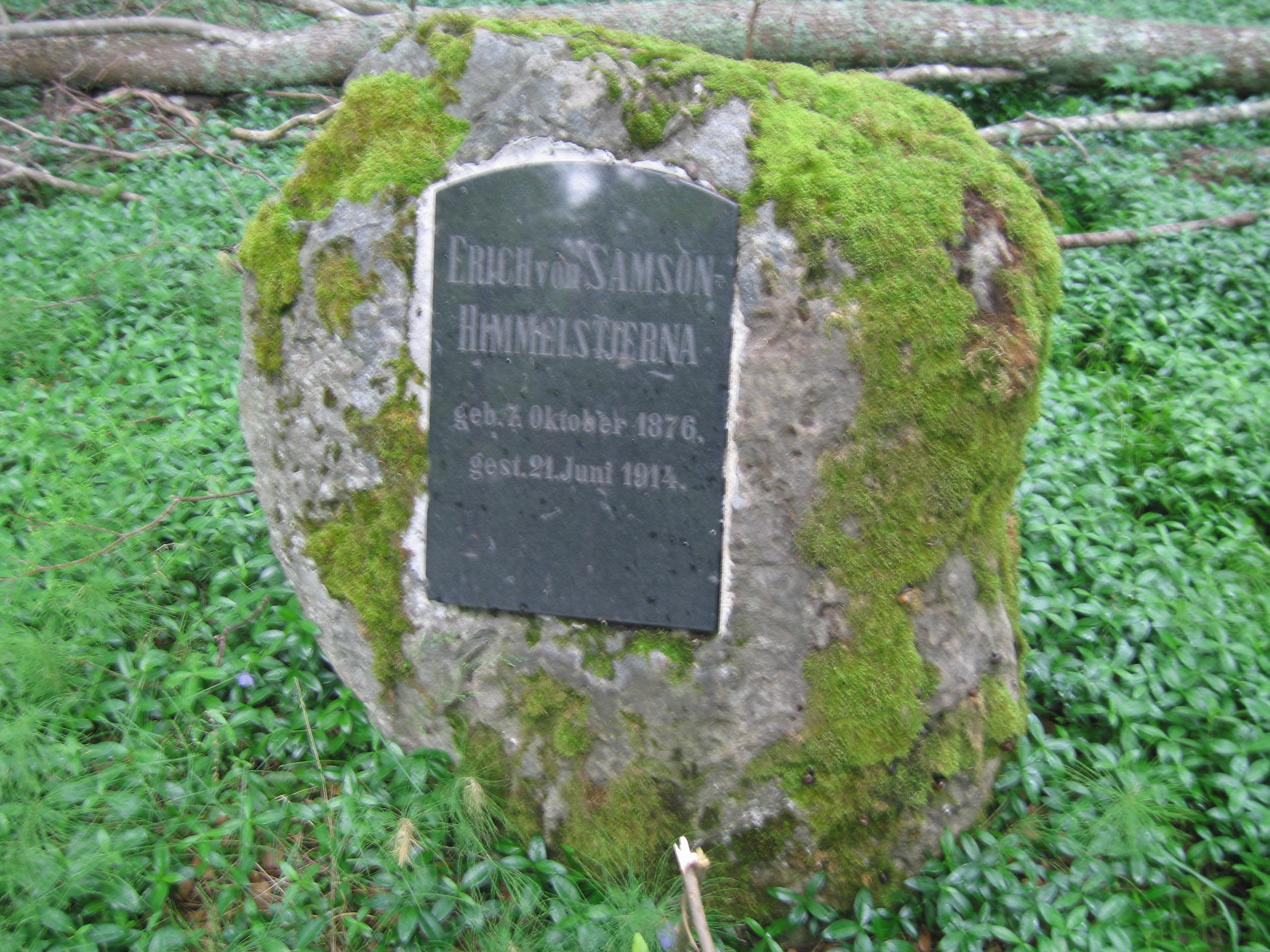 Erich von Samson-Himmelstjerna haua tähis